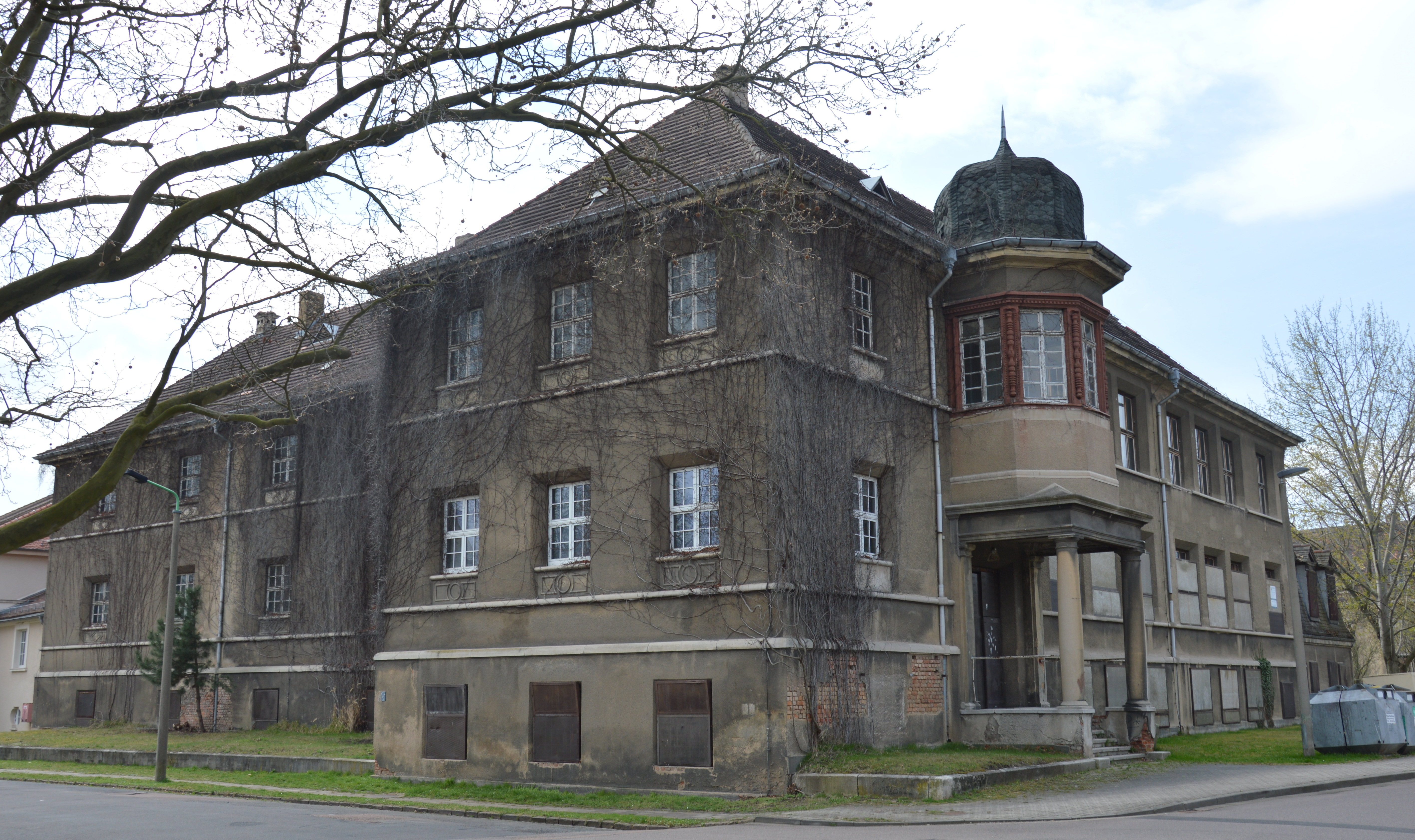 Schulgebäude Schulstraße Leuna